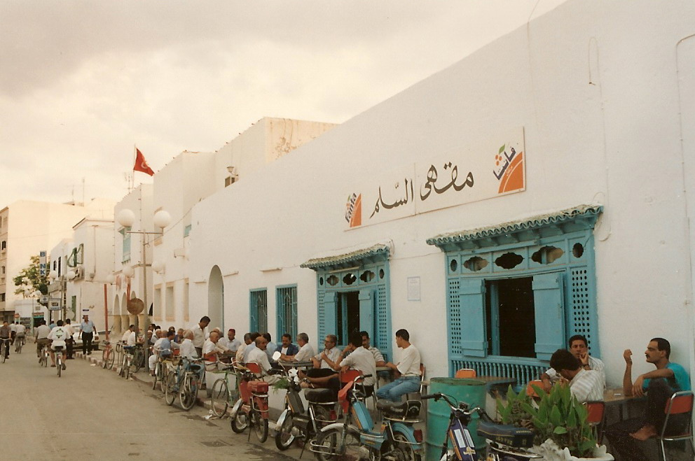 Tunisiens à une terrasse de café à Kairouan (Tunisie)